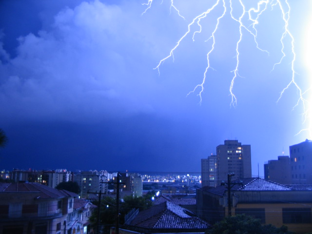 Lightning in Sao Paulo, Brazil